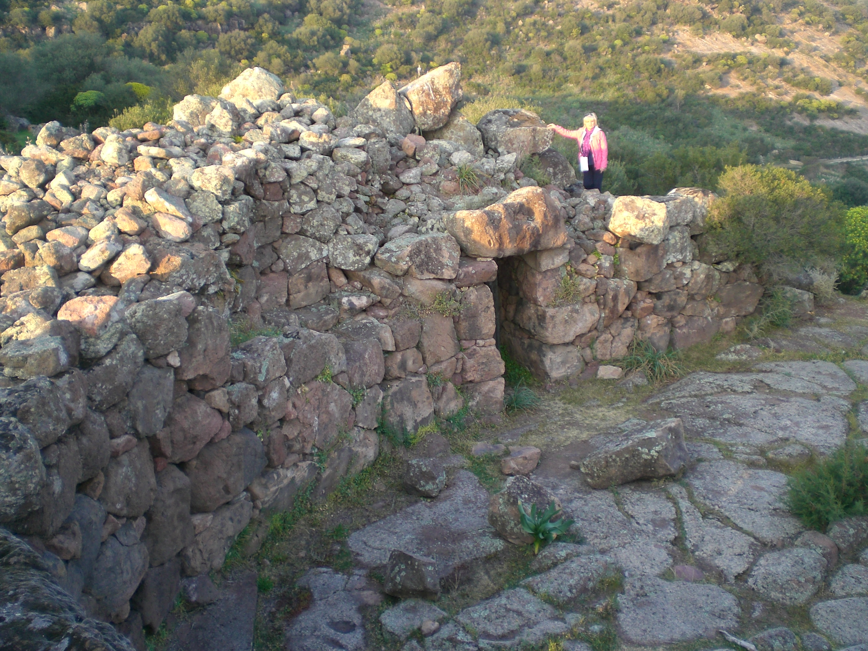 Complesso prenuragico di Monte Baranta, Olmedo, Sardegna, Italy